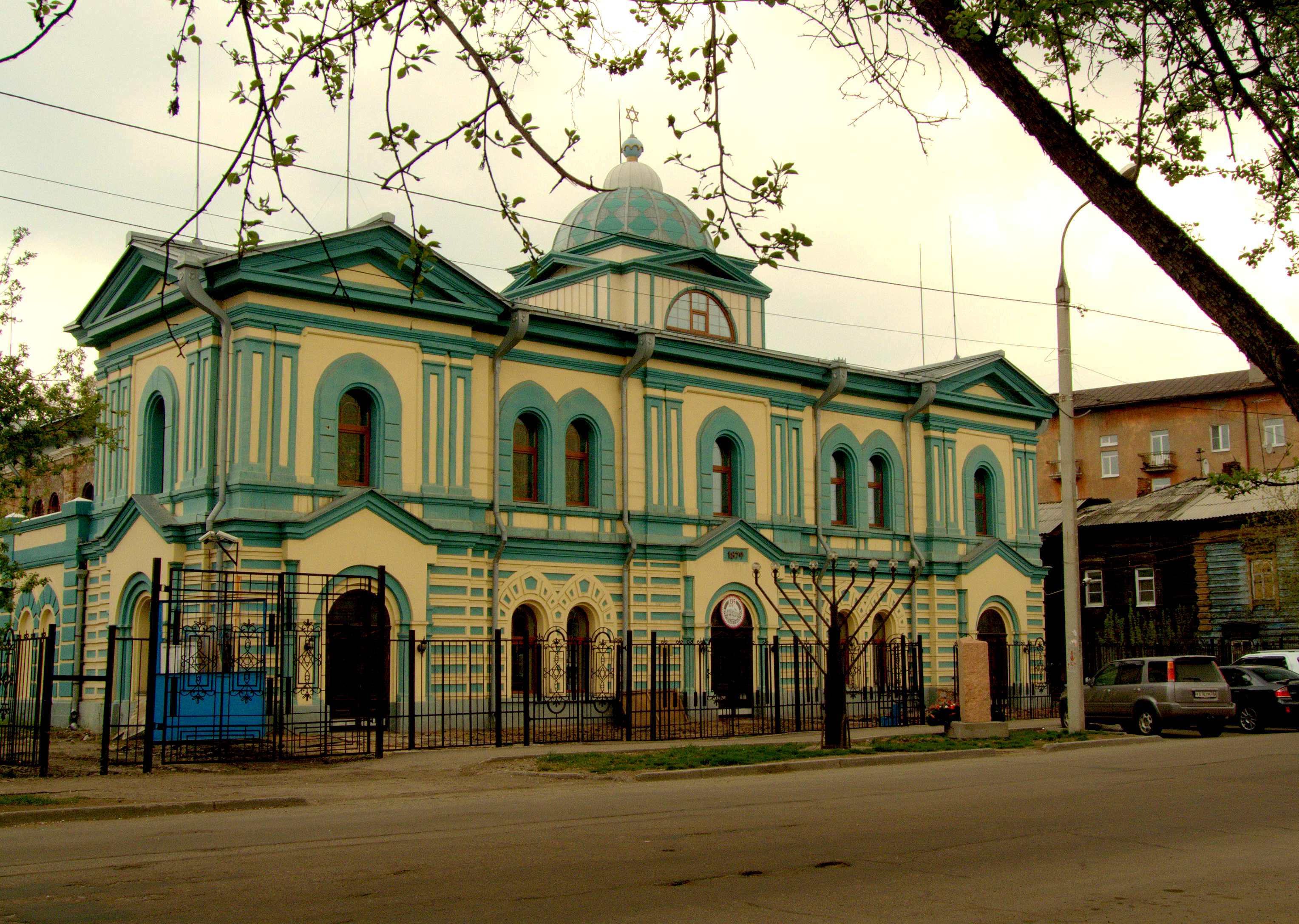 Синагога (дом еврейского общества): улица Карла Либкнехта, 23, Иркутск, Иркутская область